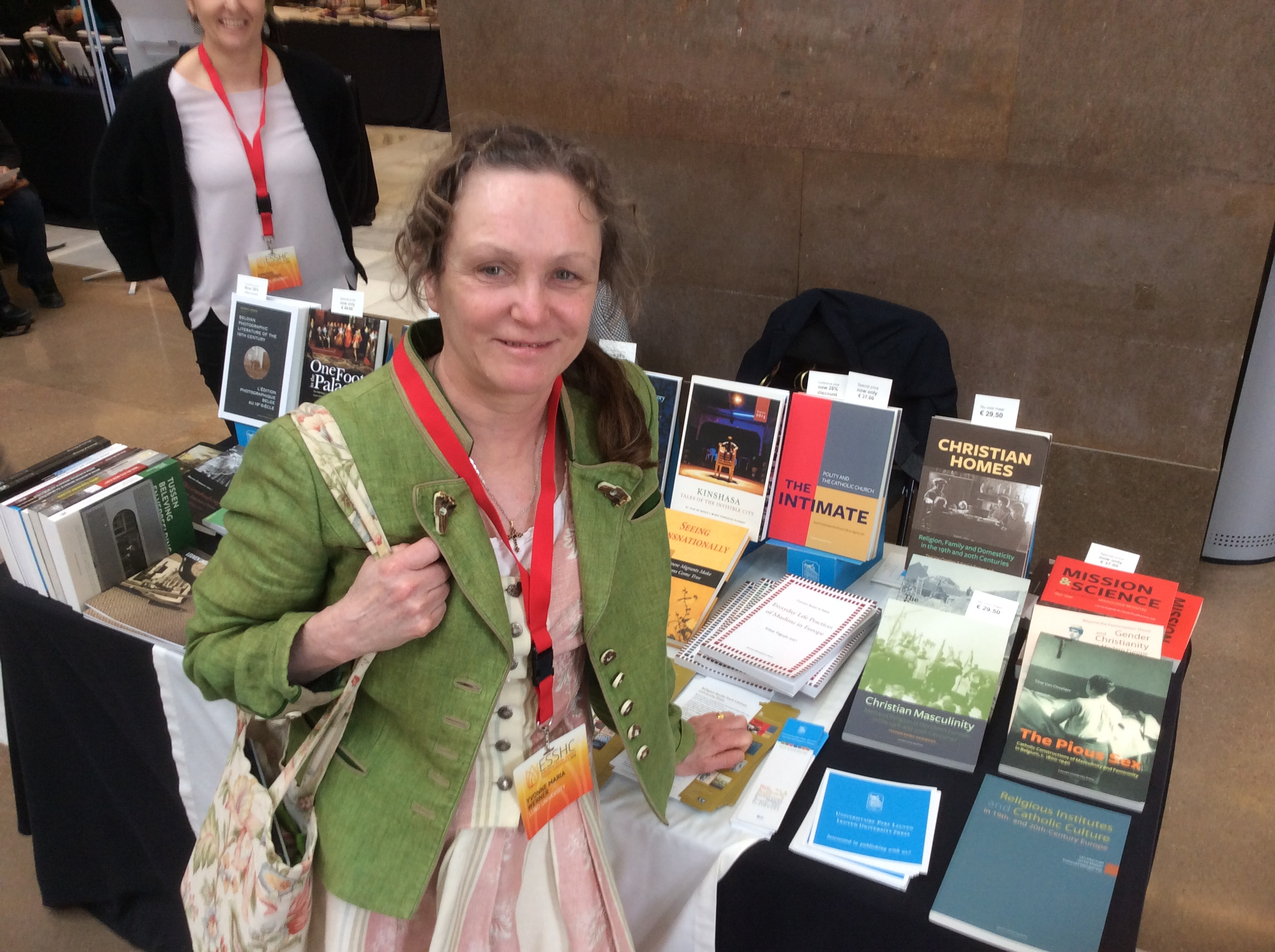 Yvonne Maria Werner på konferens i Valencia.